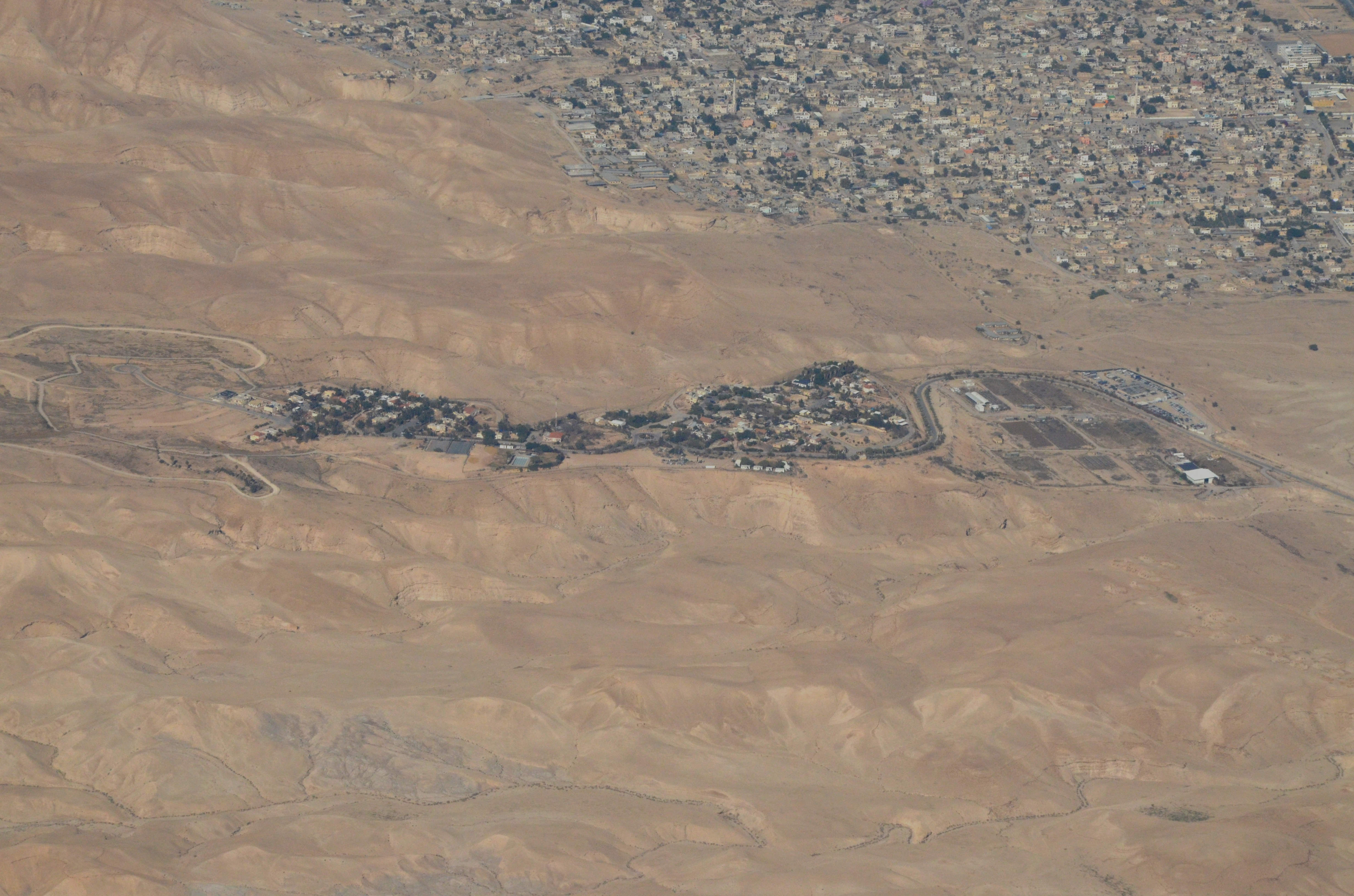 ורד יריחו